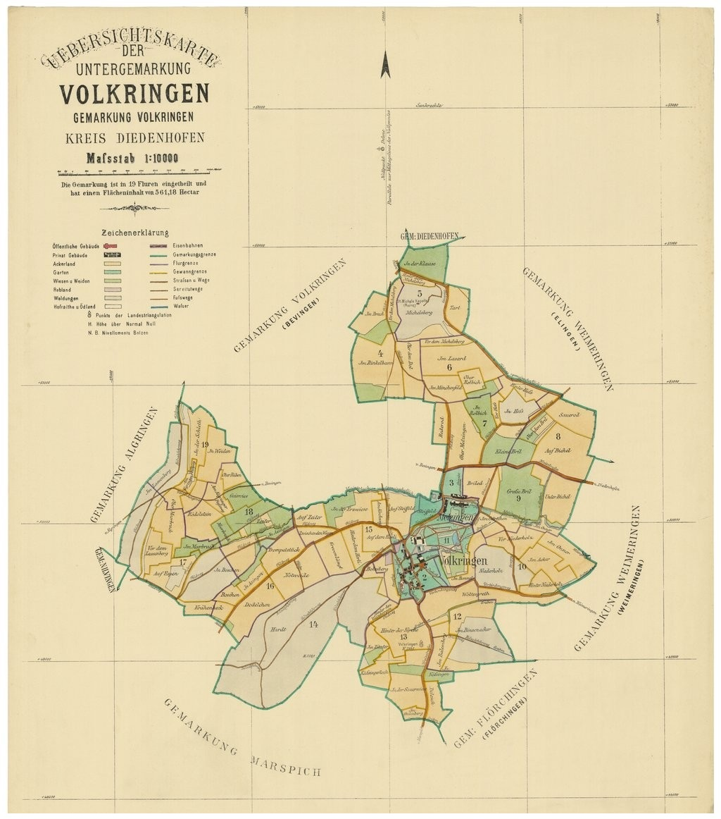 Plans cadastraux -- France -- Volkrange (Moselle). Cadastre établi en 1810, revu en 1893.